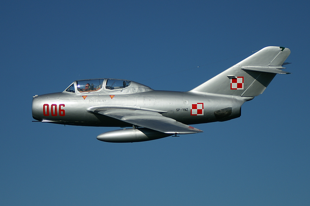 Mig 15 II